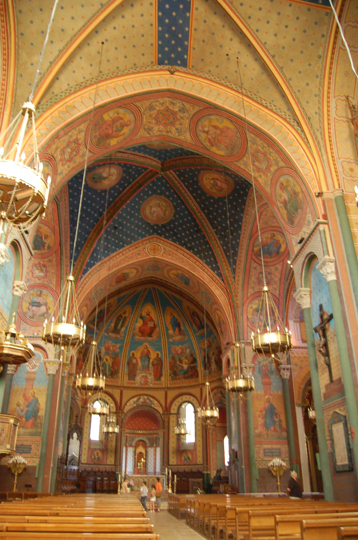 Intérieur de la Cathédrale Saint-Caprais d'Agen